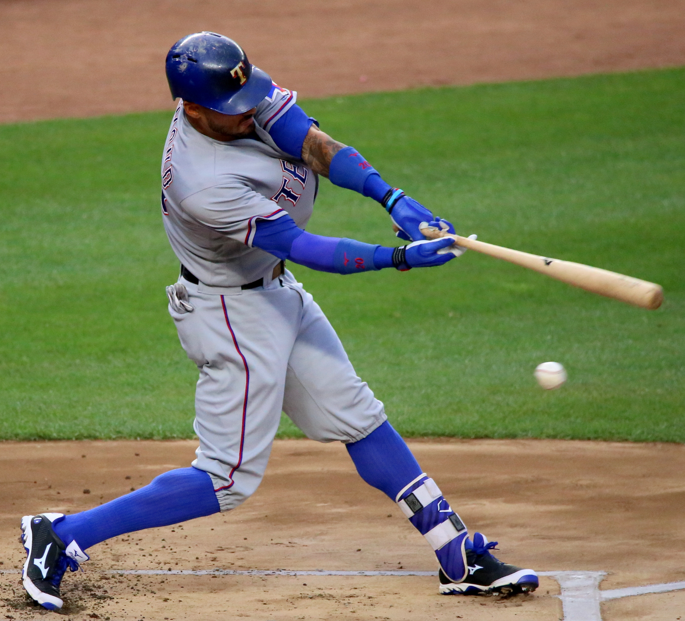 Ian Desmond